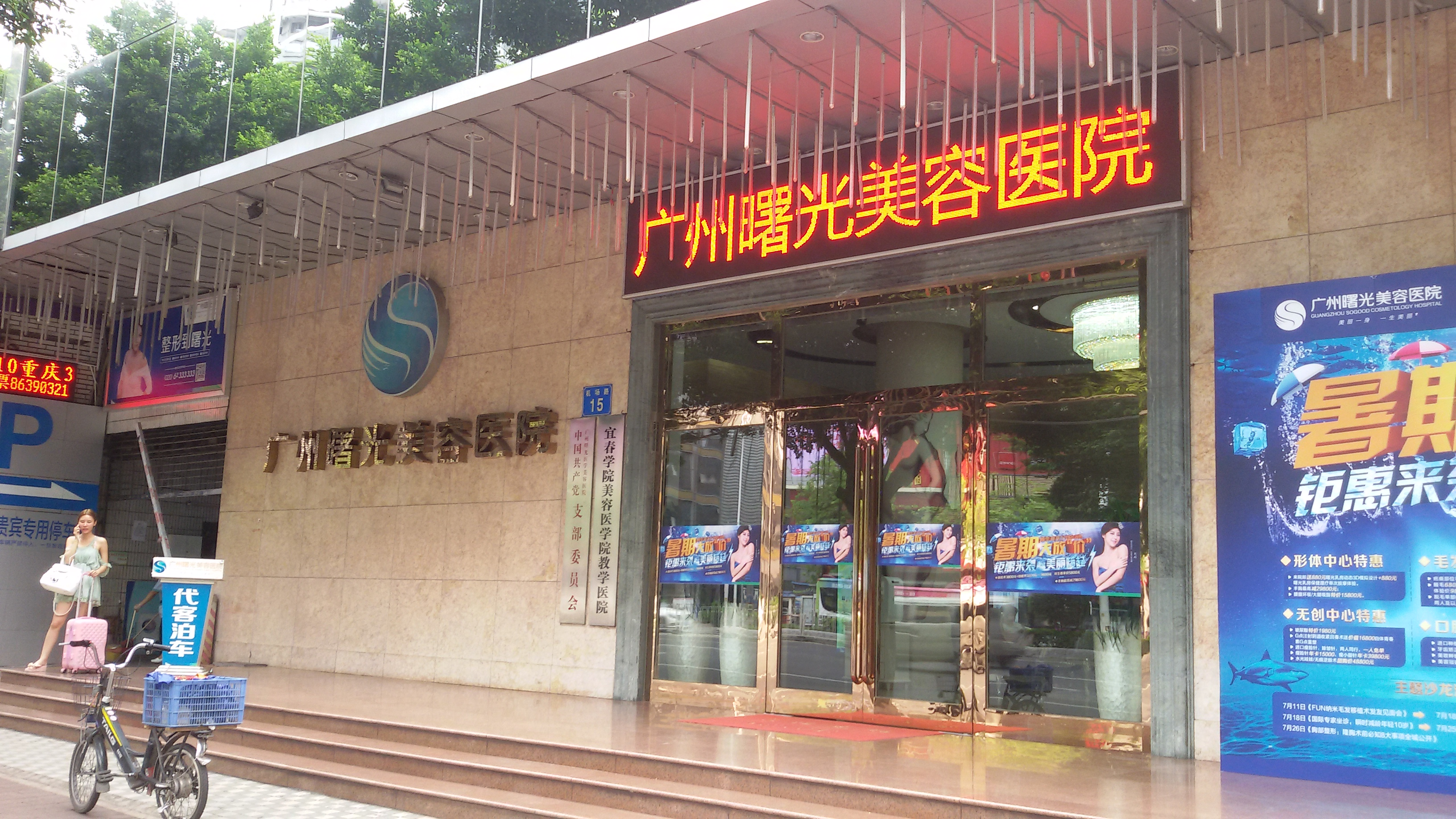 粵語: 廣州曙光美容醫院